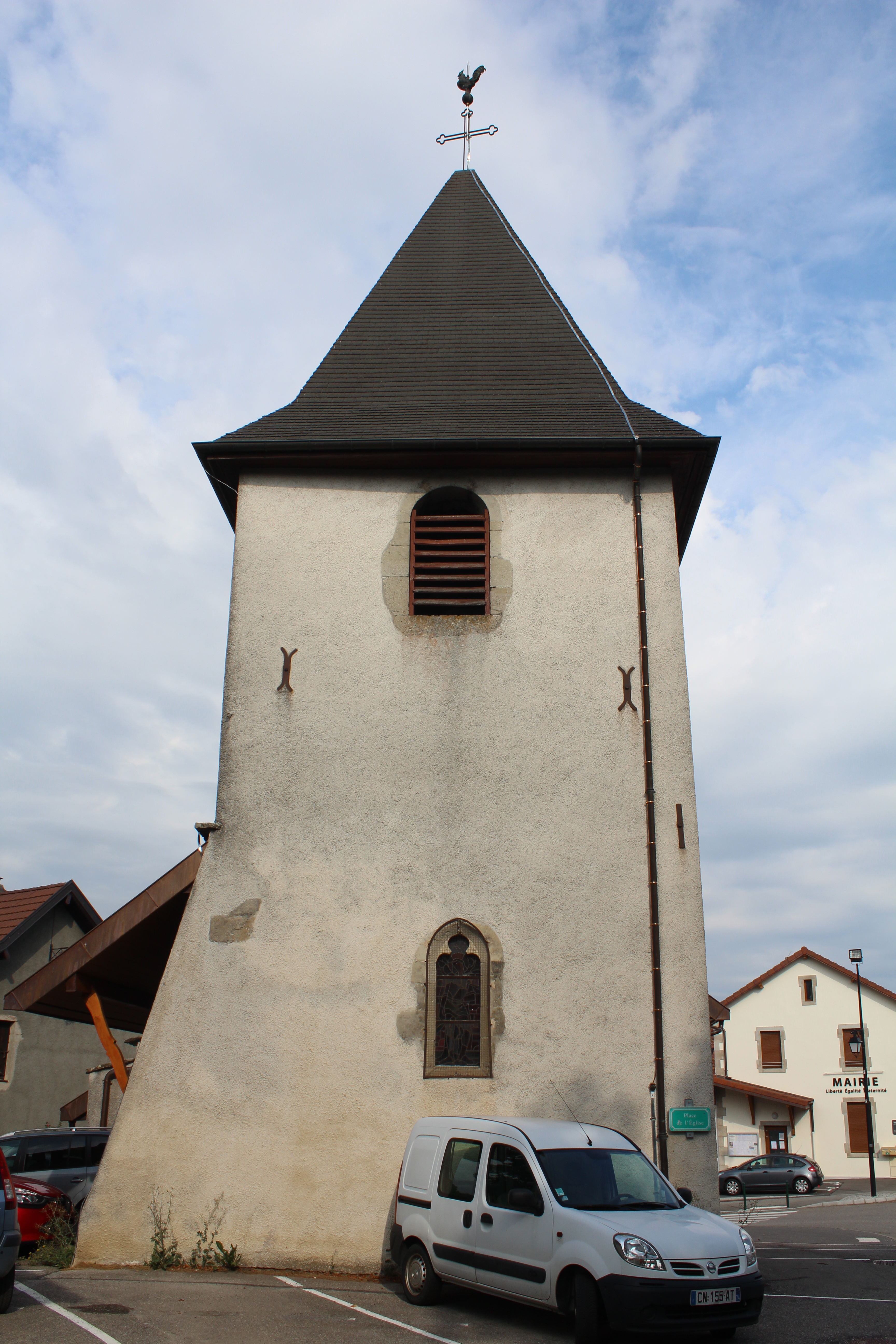 Église Saint-Sébastien de Droisy, Haute-Savoie.